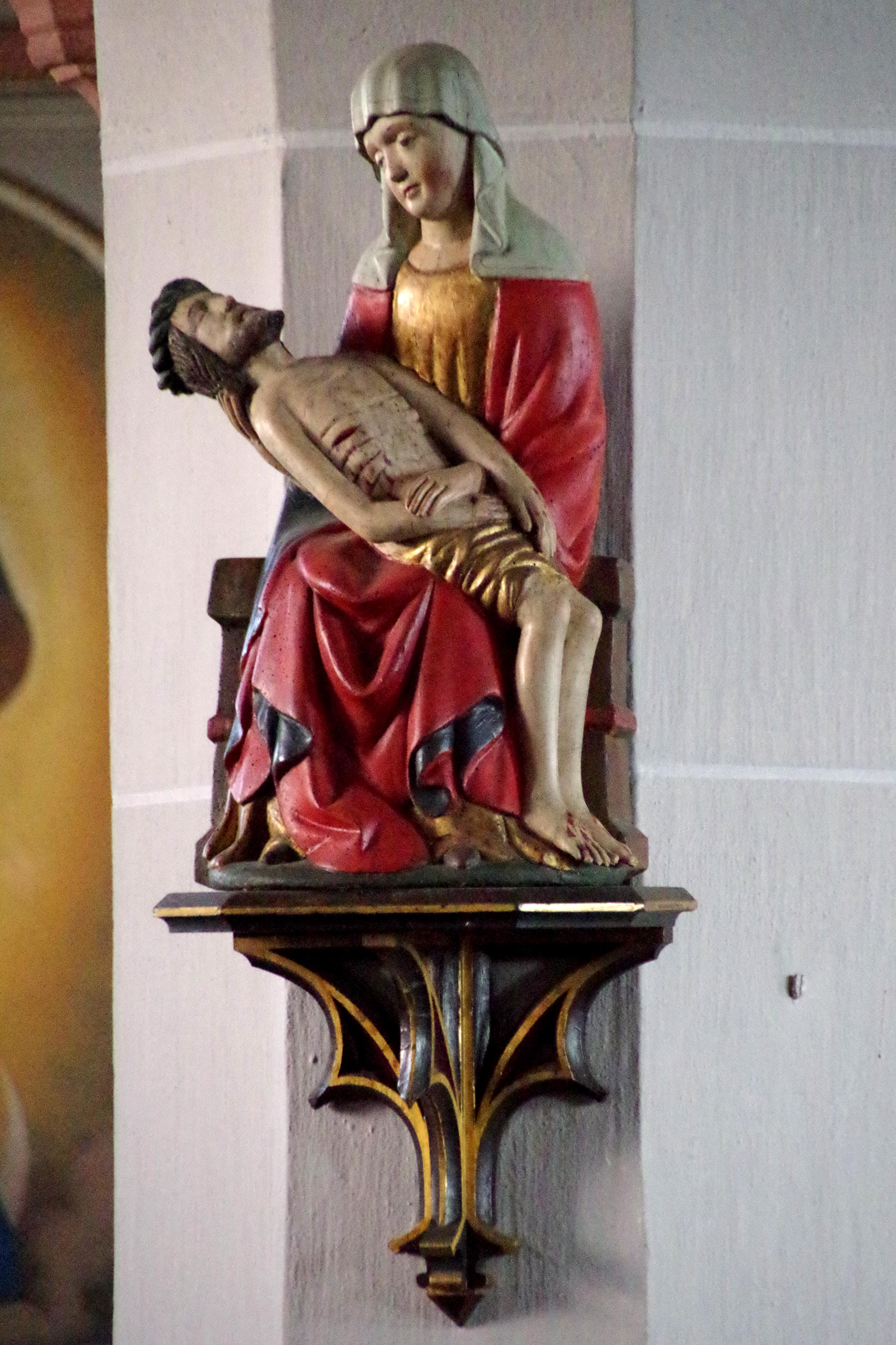 St. Kunibert (Sinzenich), Pietà